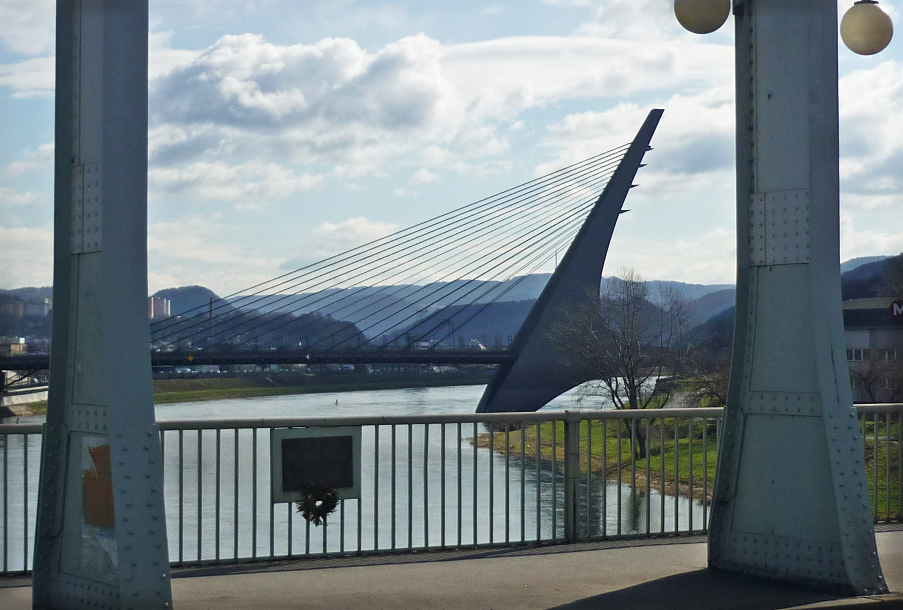 Gedenktafel an das Massaker von Aussig auf der Edvard-Beneš-Brücke in Aussig (Ústí nad Labem) im Jahr 1945